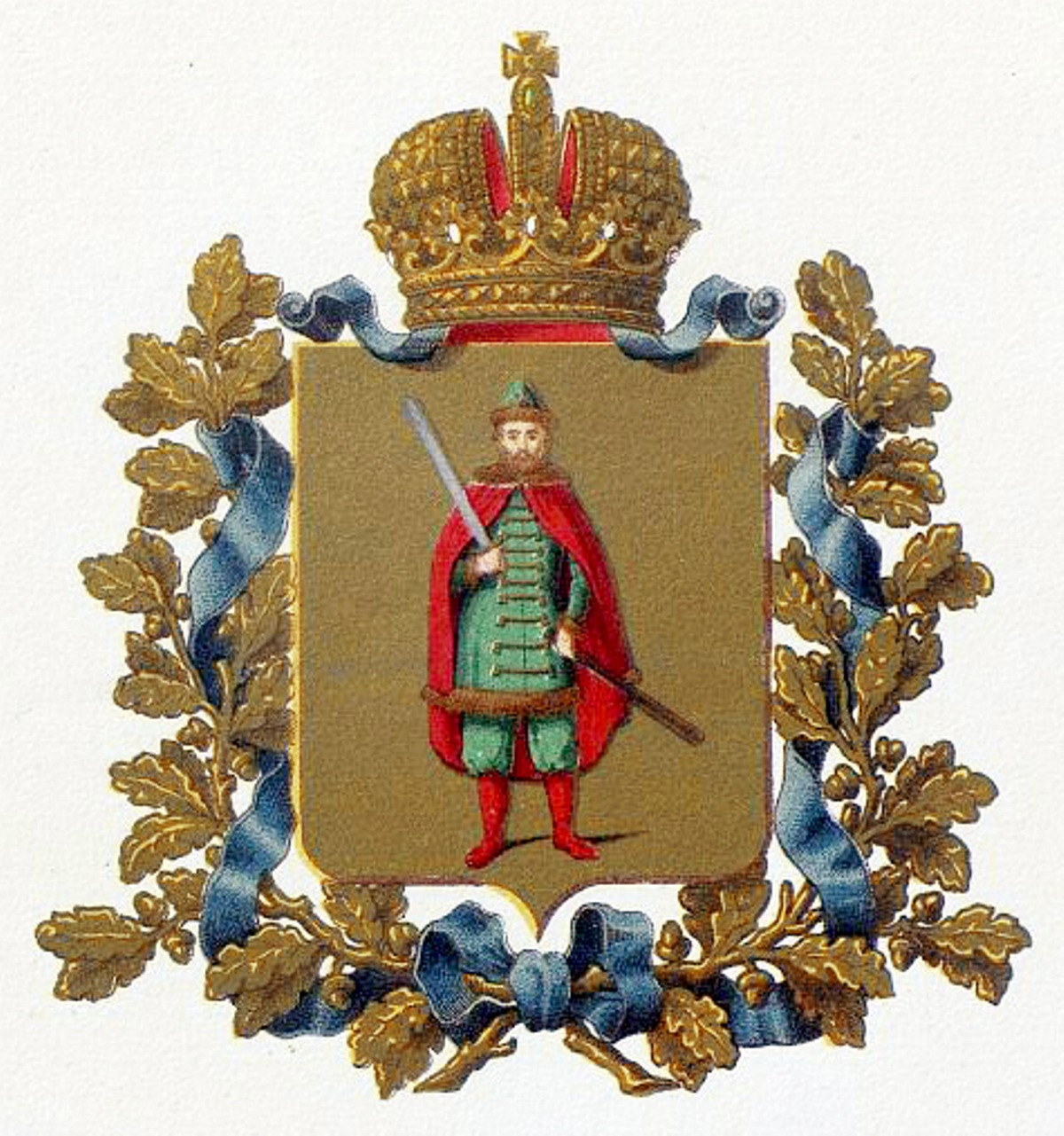 Official Russian Empire coat of arms Ryazan Governorate. Герб Российской Империи Рязанской губернии в Гербовнике Бенке. Утверждён Императором Всероссийским Александром Вторым.